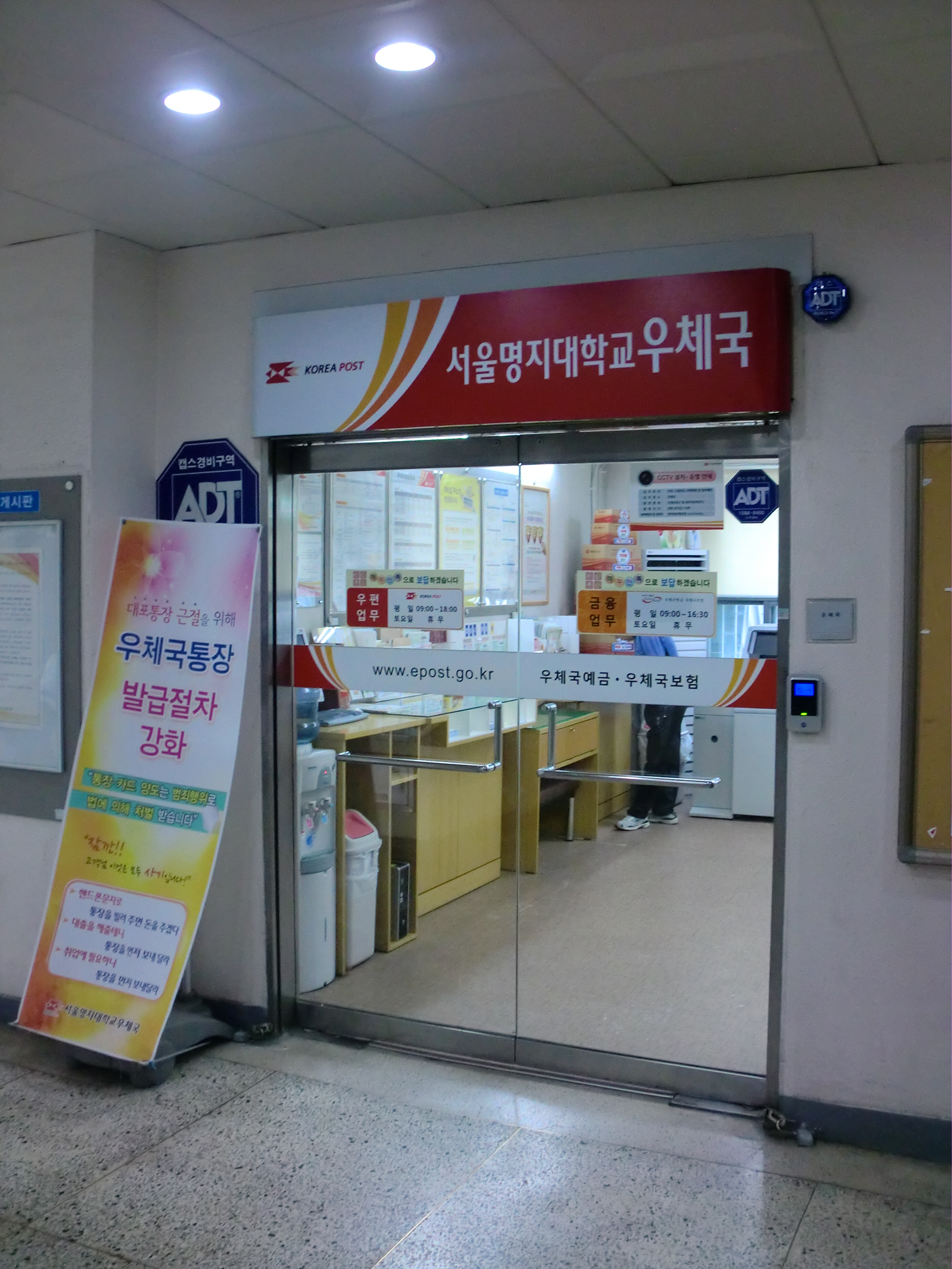 서울특별시 서대문구에 있는 서울명지대학교우체국